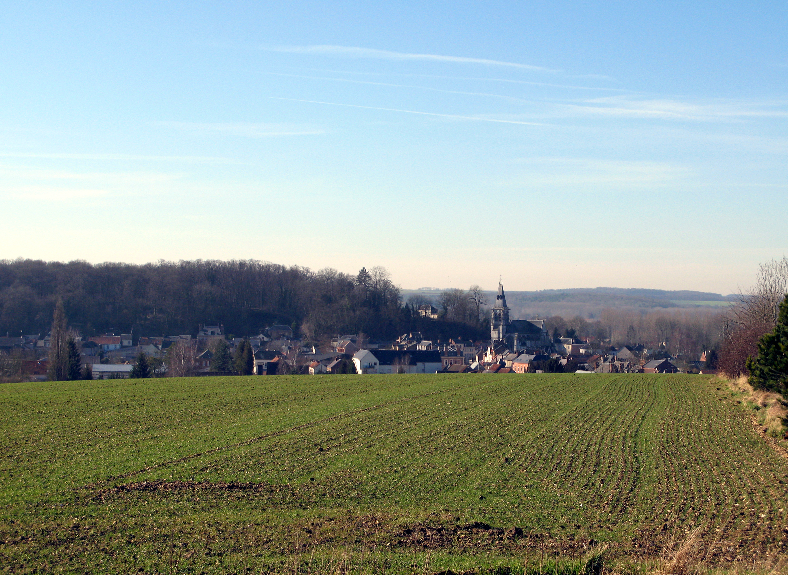 Conty (Somme, France) - L'église et le bourg que surplombe la pente boisée où se trouvait le château. Vue prise depuis la route venant de l'Est (en provenance d'Ailly-sur-Noye). .